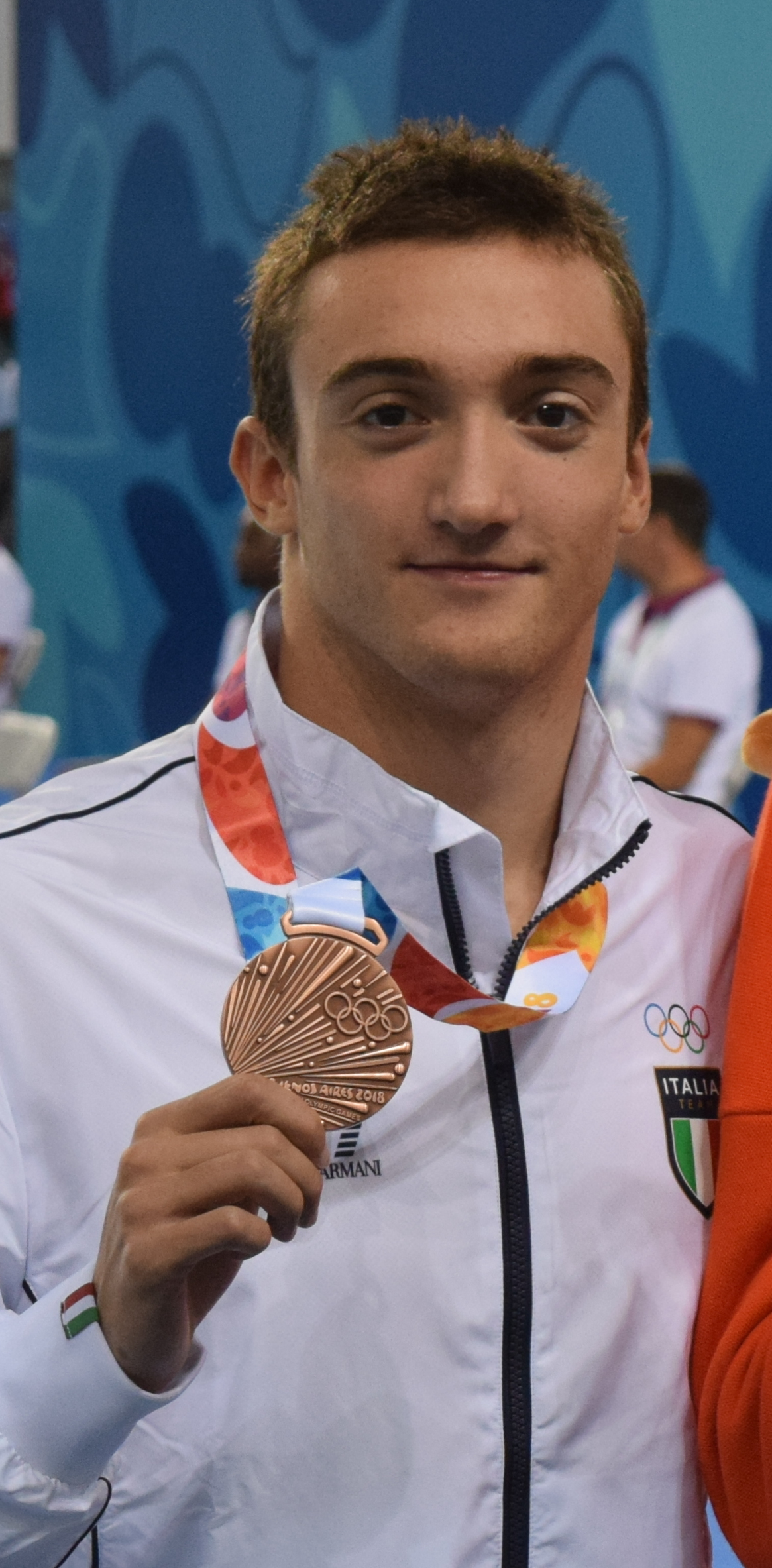 inales de natación , durante los Juegos Olímpicos de la Juventud 2018 en Buenos Aires. Tarde del 10 de octubre. Kristof MILAK, Denys KESIL y Federico BURDISSO.